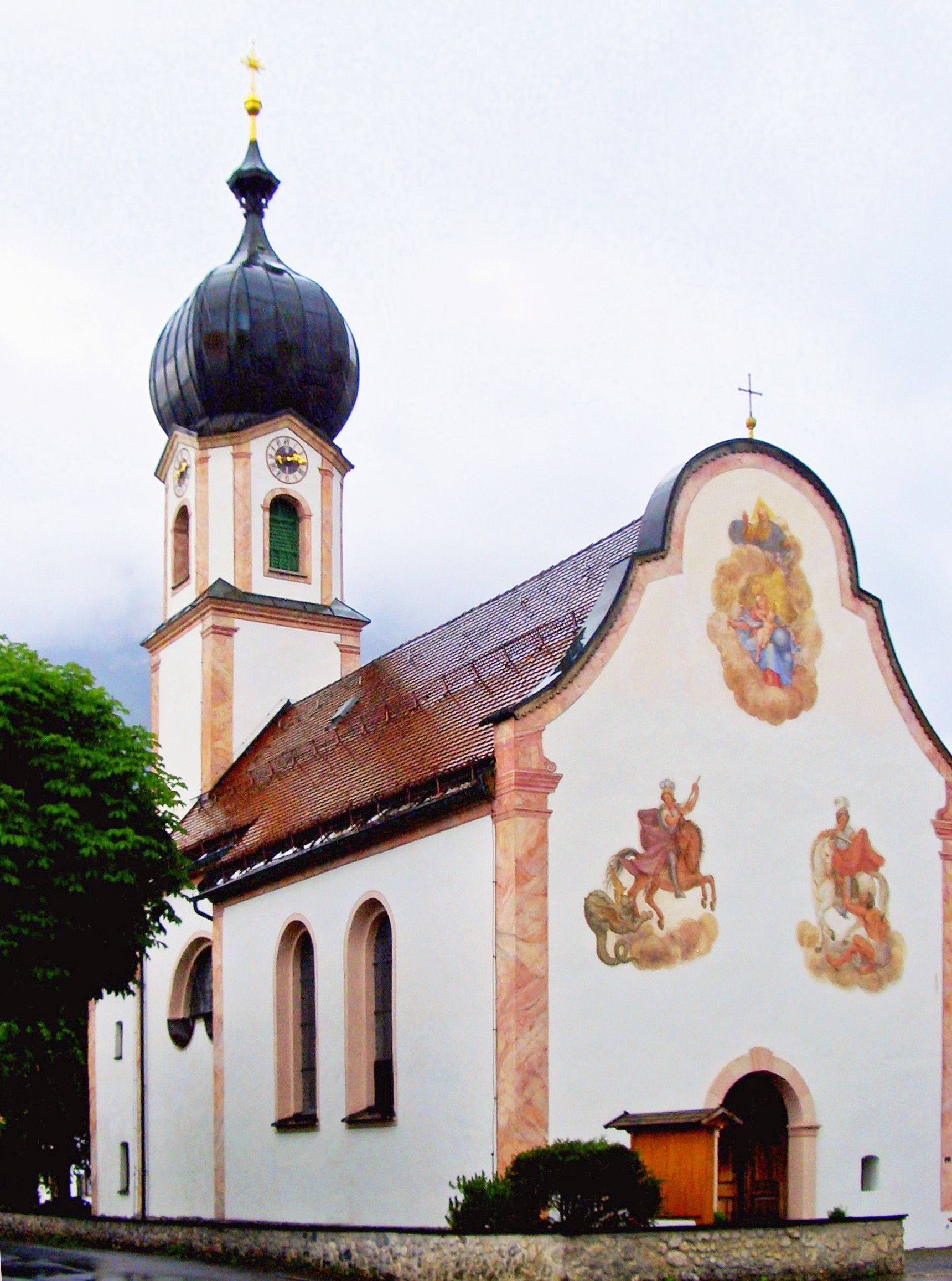 St. Sebastian in Krün, Oberbayern